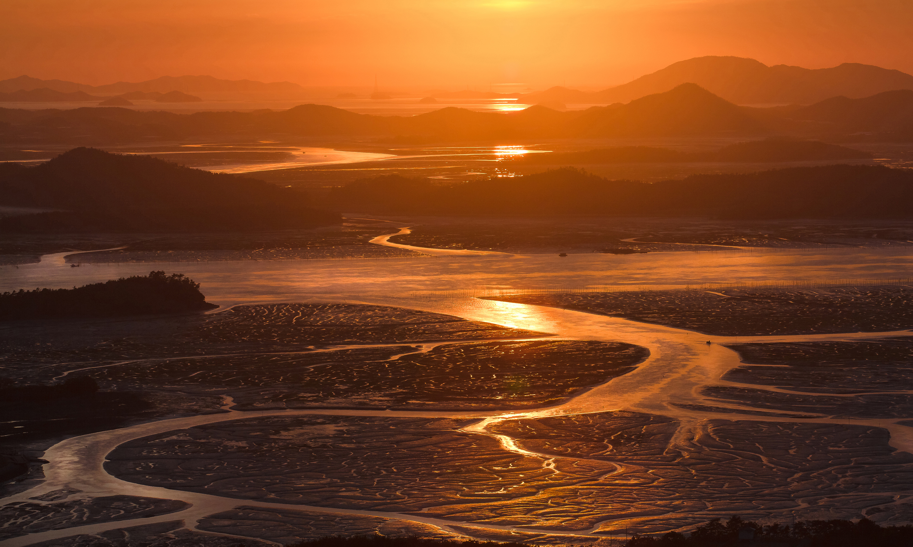 아름다운 무안갯벌